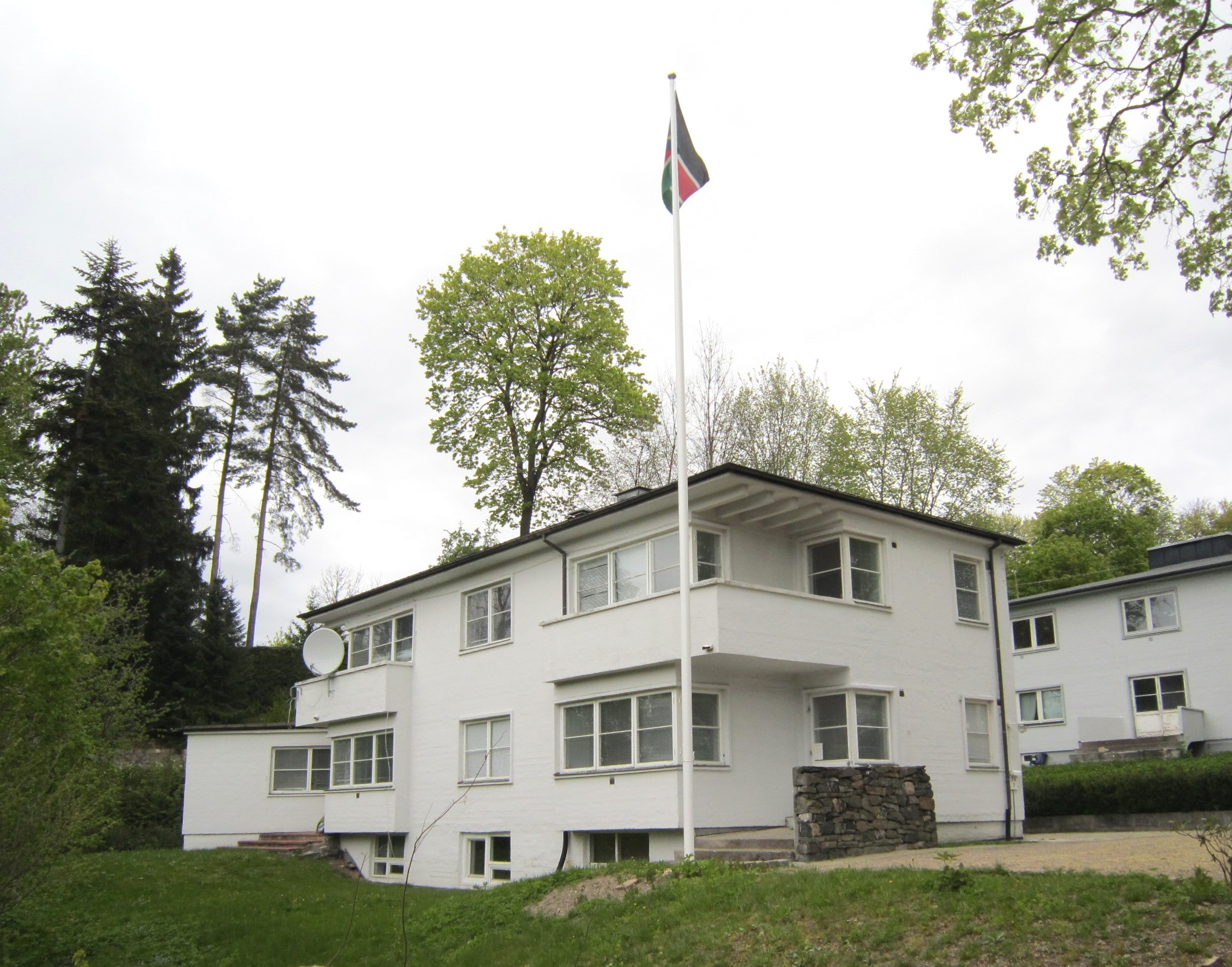 Sør-Sudans ambassade i Prinsessealleen 2 i Oslo